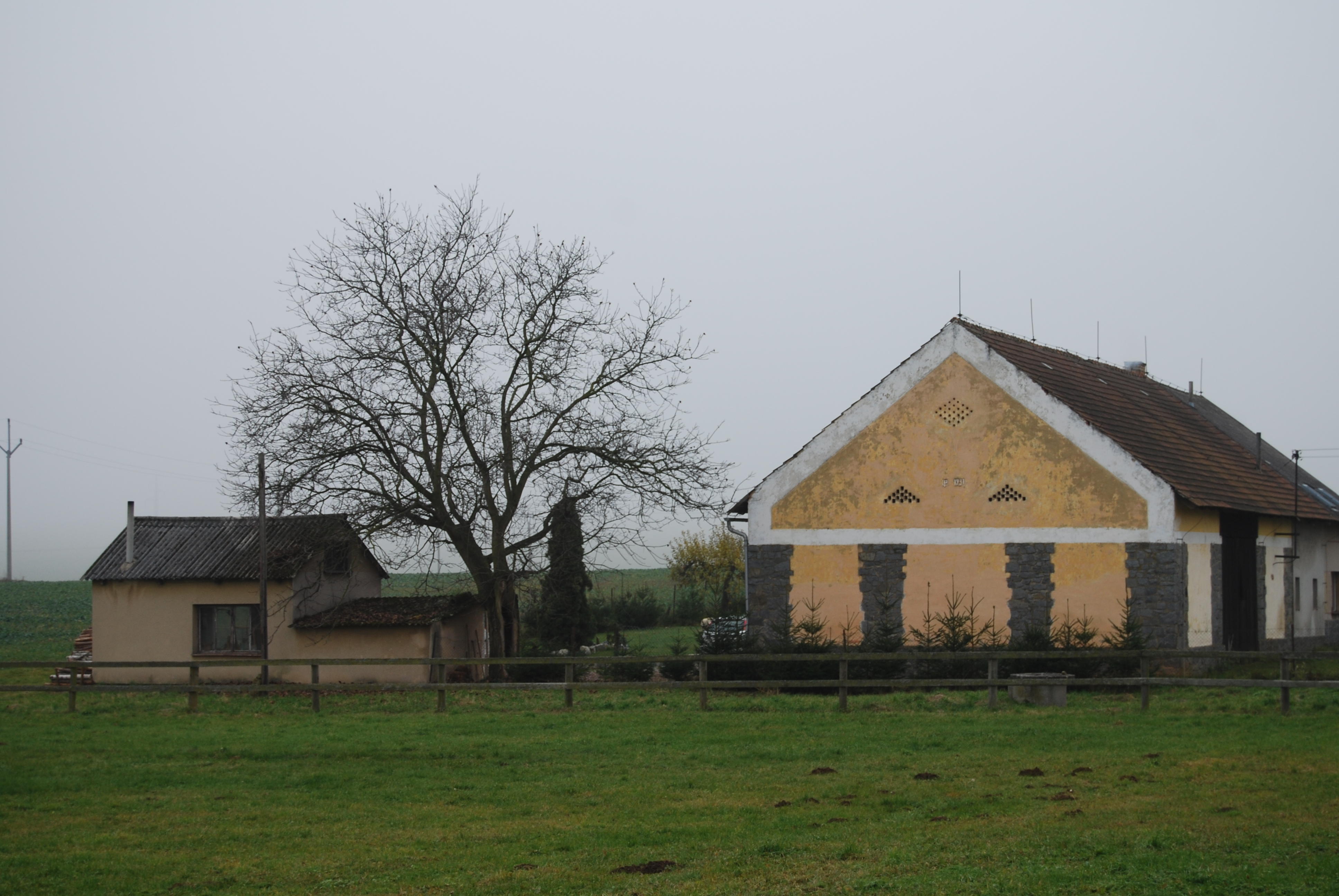 Pohled na část obce. Draheničky je část obce Mišovice v okrese Písek. Česká republika.